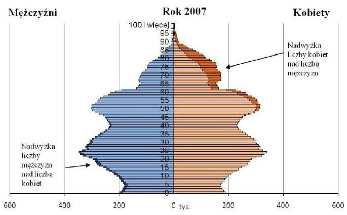 Piramida_wieku_ludnosci_(GUS_2007)